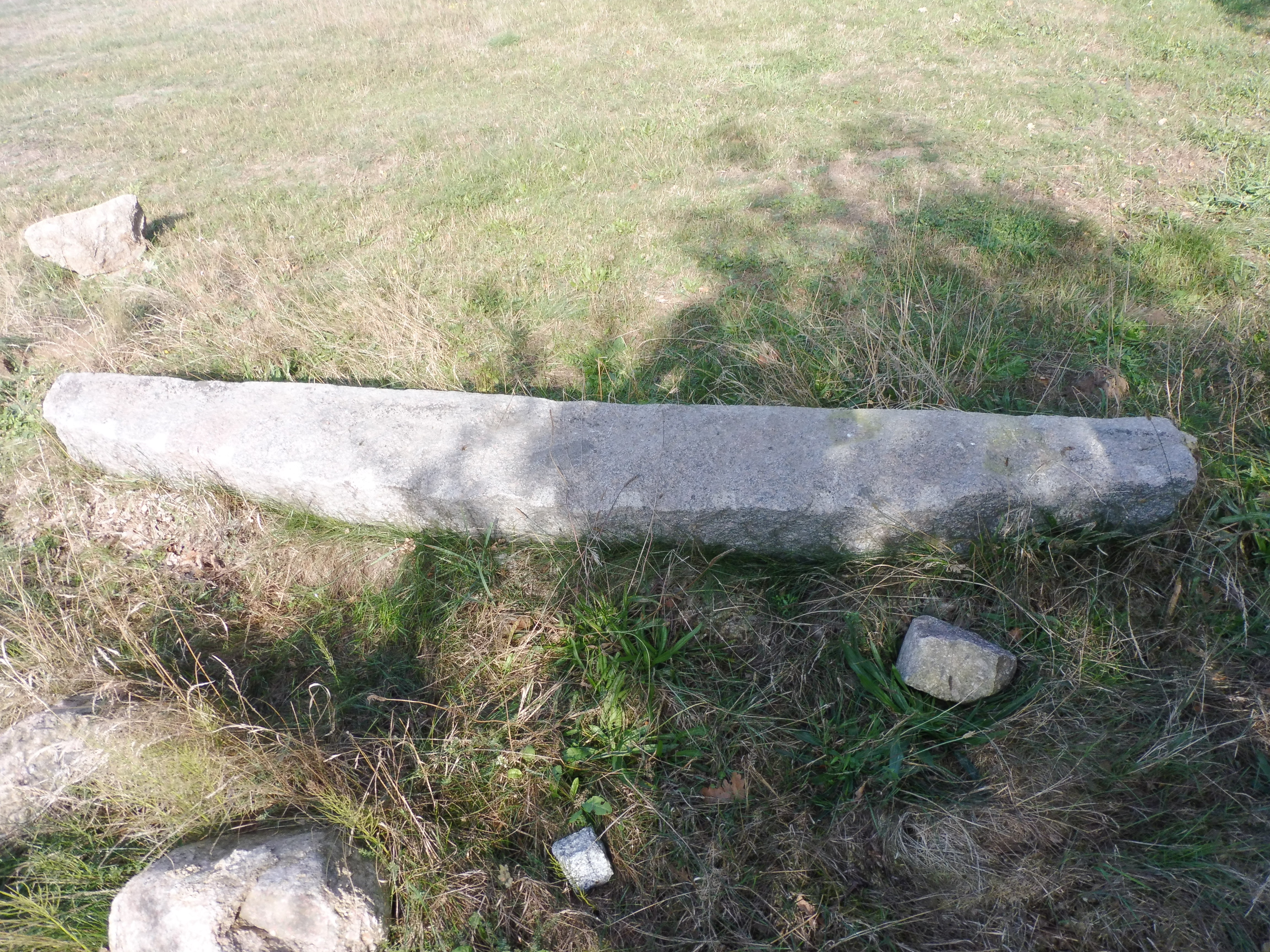 Alter Granitsturz unbekannter Herkunft in Leisten, Mecklenburg